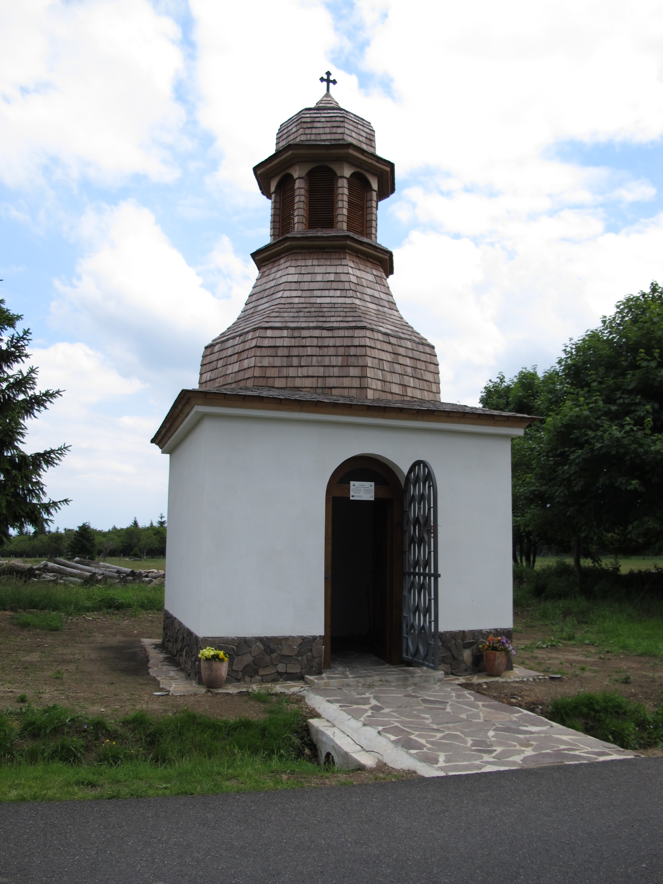 Obnovená kaplička se zvonicí v Lesné (okres Most)